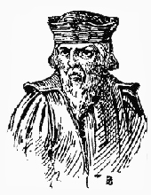 Antonio Ferreira (Lisboa, 1528 - 29 de novembro de 1569) foi um escritor e humanista português. É considerado um dos maiores poetas do classicismo renascentista de língua portuguesa, conhecido como "o Horácio português".